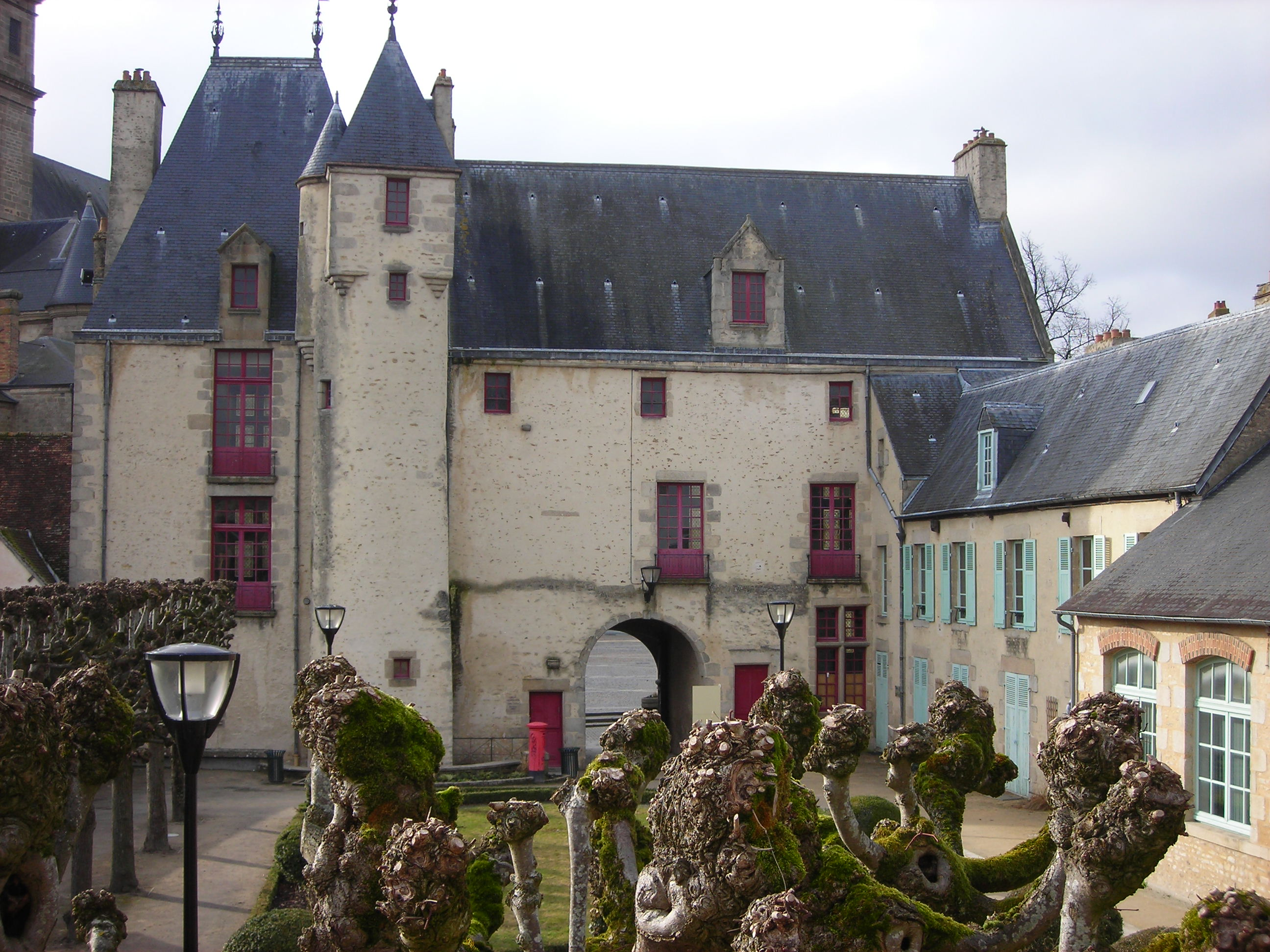 Maison d’Ozé située dans le quartier Saint-Léonard à Alençon (61)